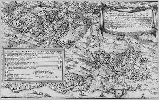 Titre : Pianta del nuovo aquedotto che conduce l'acqua a Civita Vechia / Cintius Florus delin. Éditeur : nella stamperia di Domenico de Rossi Civitavécchia Environs Canalisations